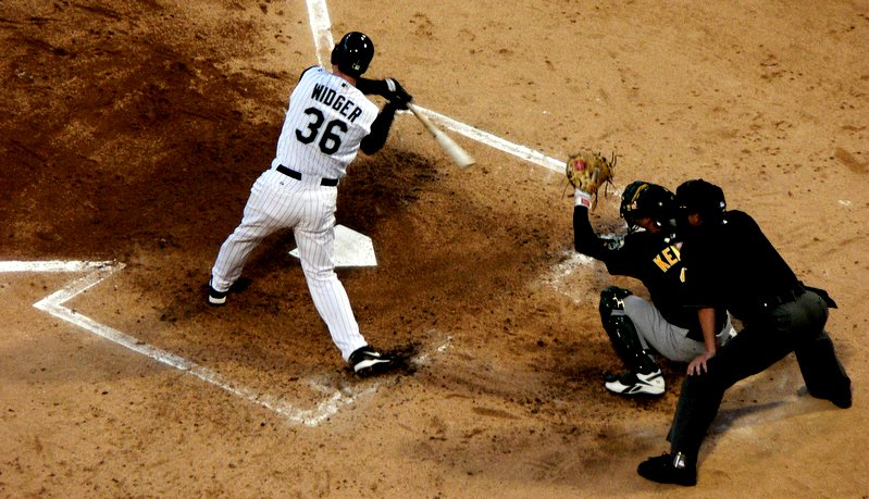 Widger at bat